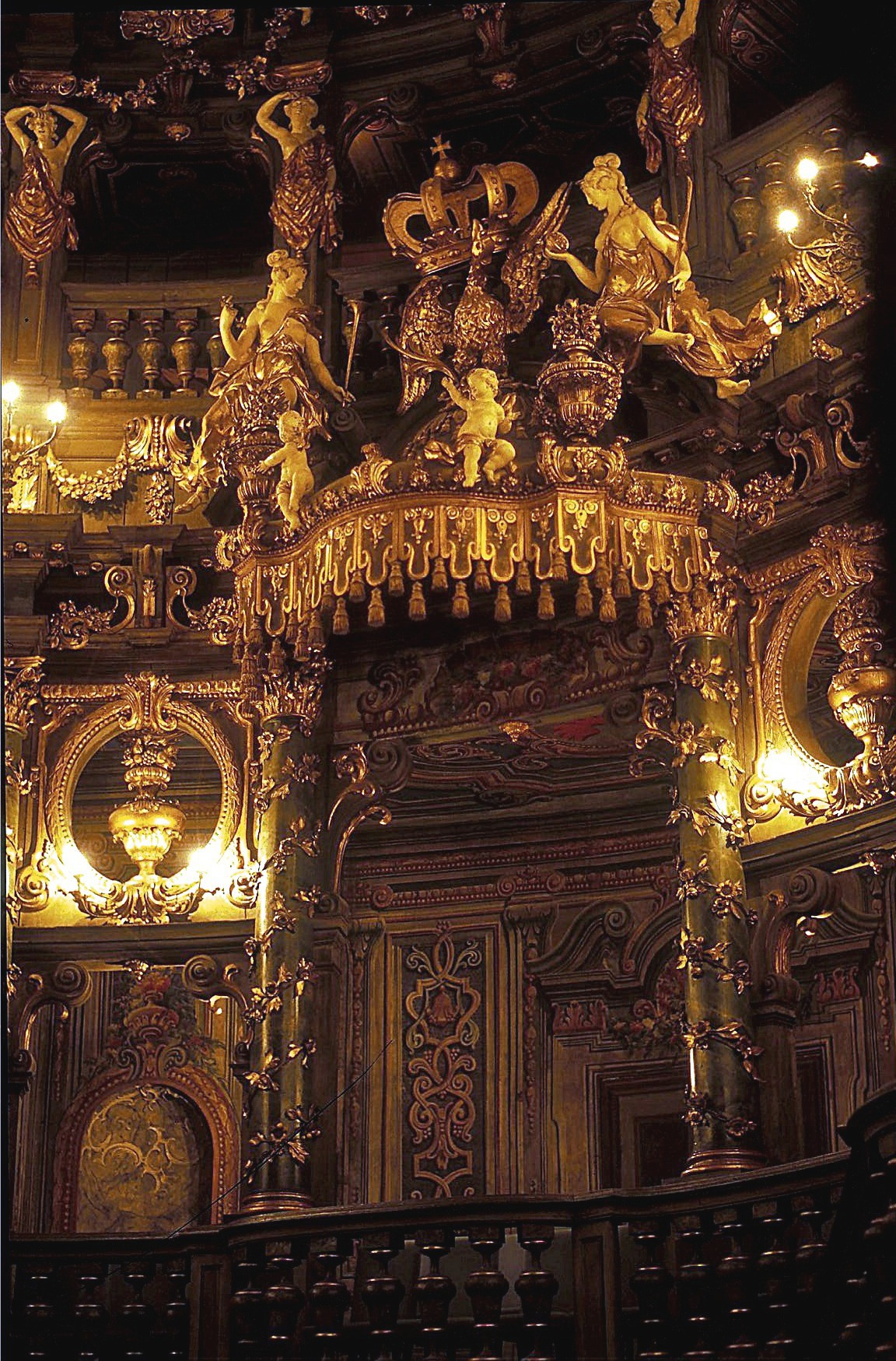 Markgräfliches Opernhaus in Bayreuth, Fürstenloge